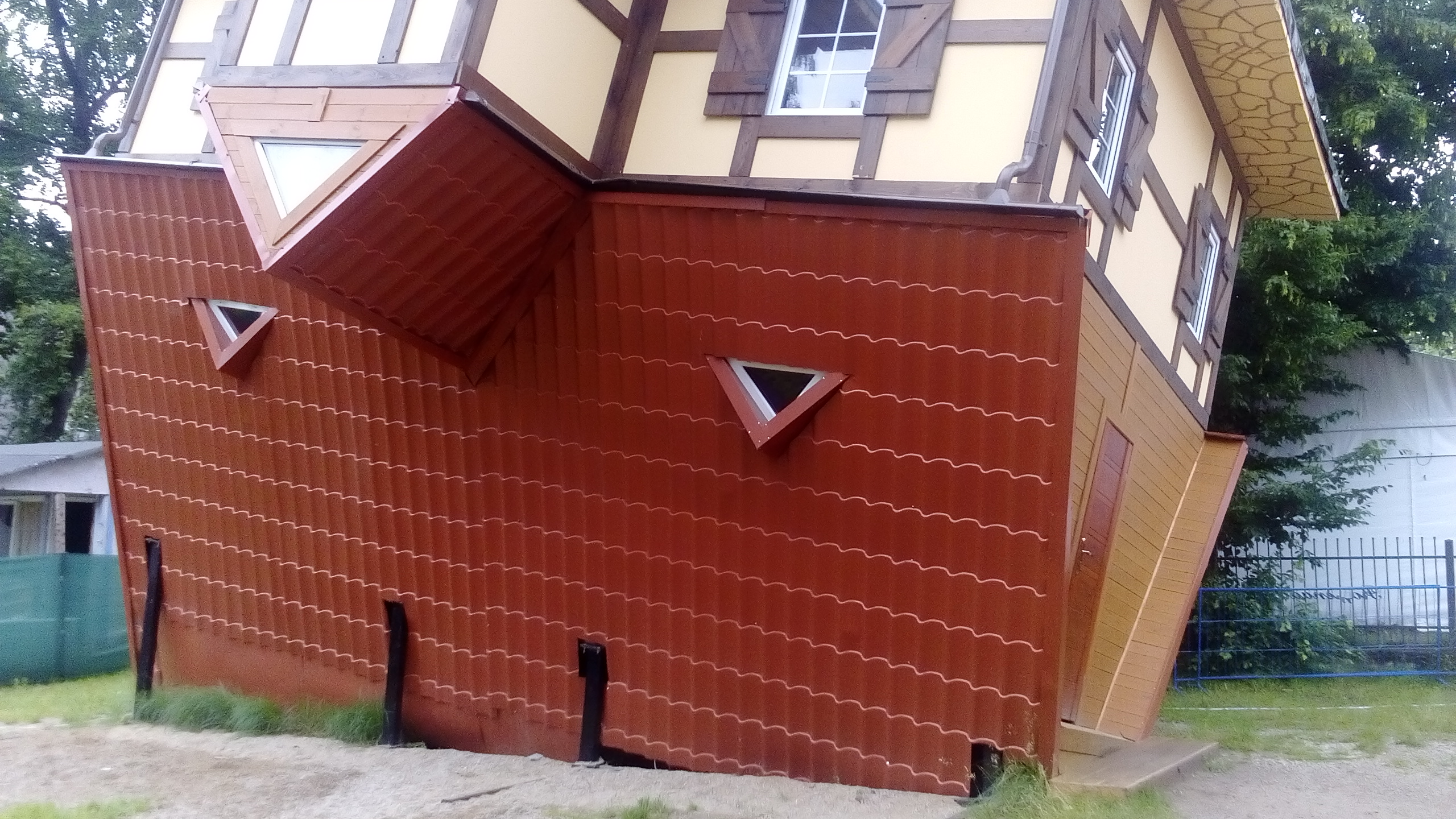 Dom do góry nogami. Atrakcja turystyczna w m. Jastrzębia Góra